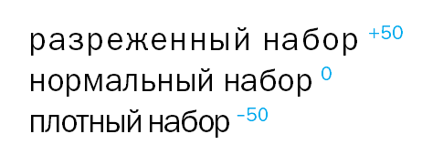 Трекинг